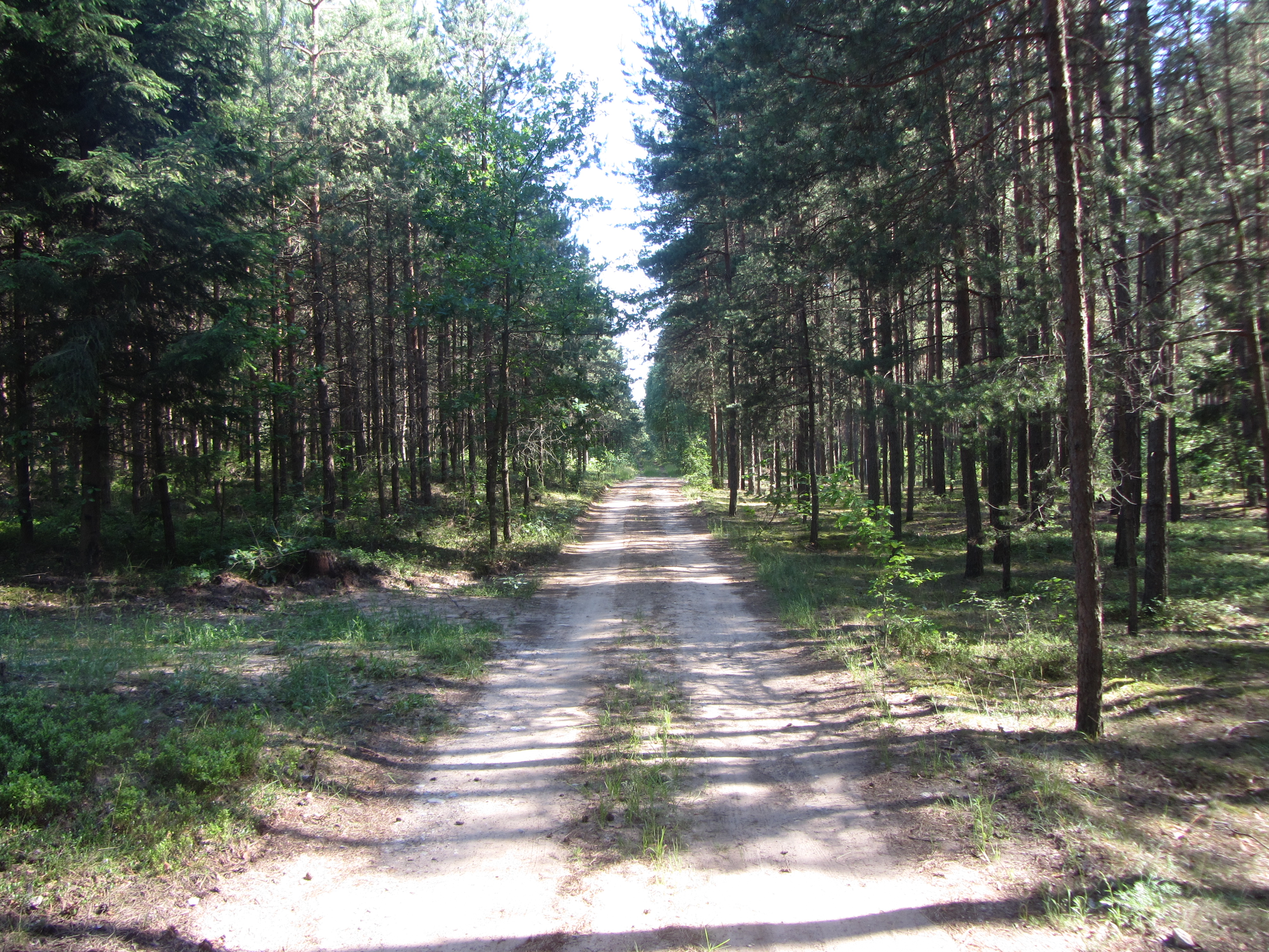 Nemunaičio sen., Lithuania